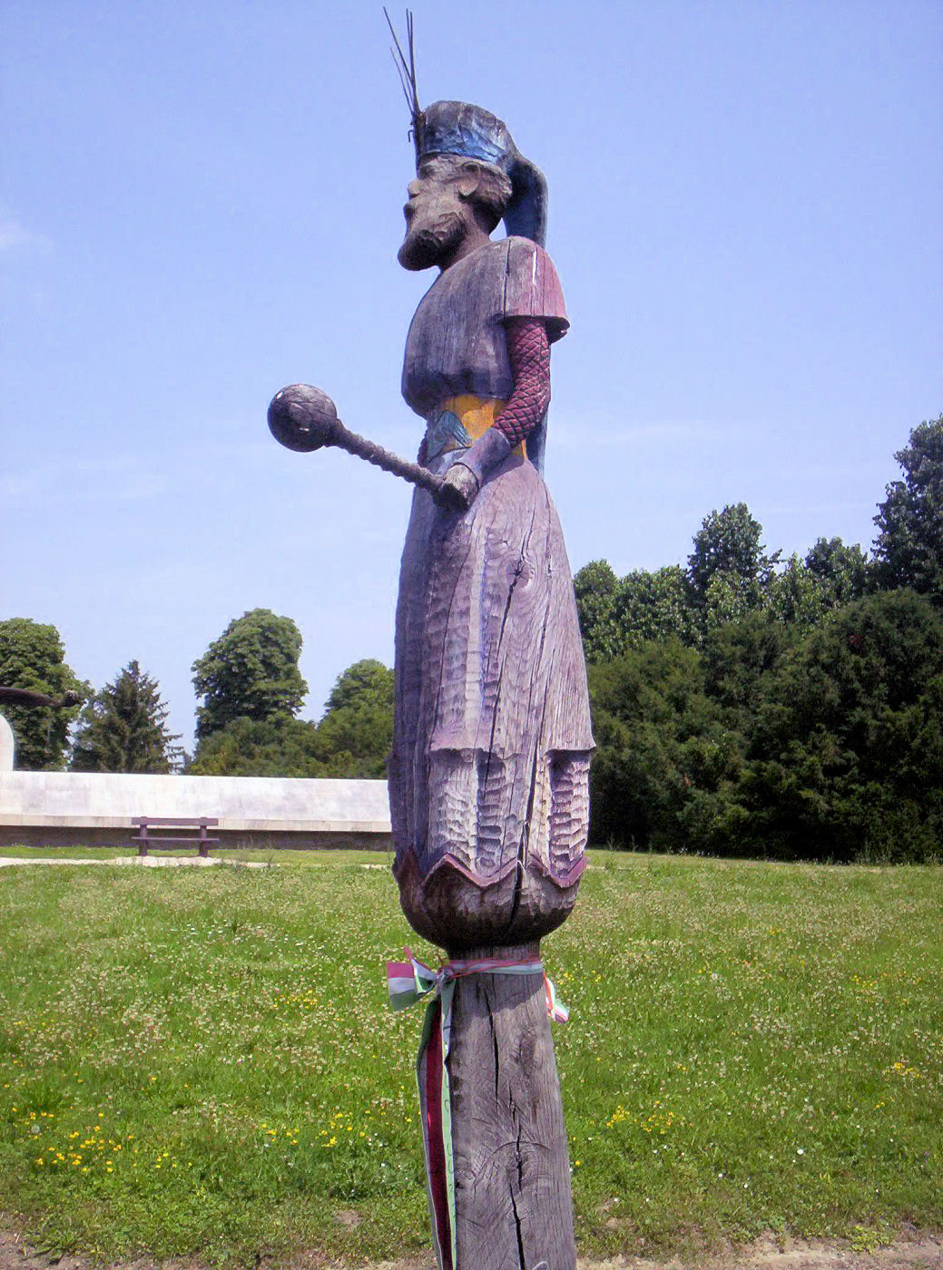 Tomori Pál faszobra a Mohácsi Történelmi Émlékparkban. Kő Pál (*1941) alkotása (1976) – photo taken by uploader User:Csanády in 2006.